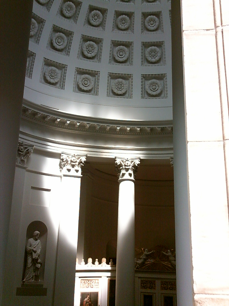 Inneres der württ. Grabkapelle auf dem Rotenberg